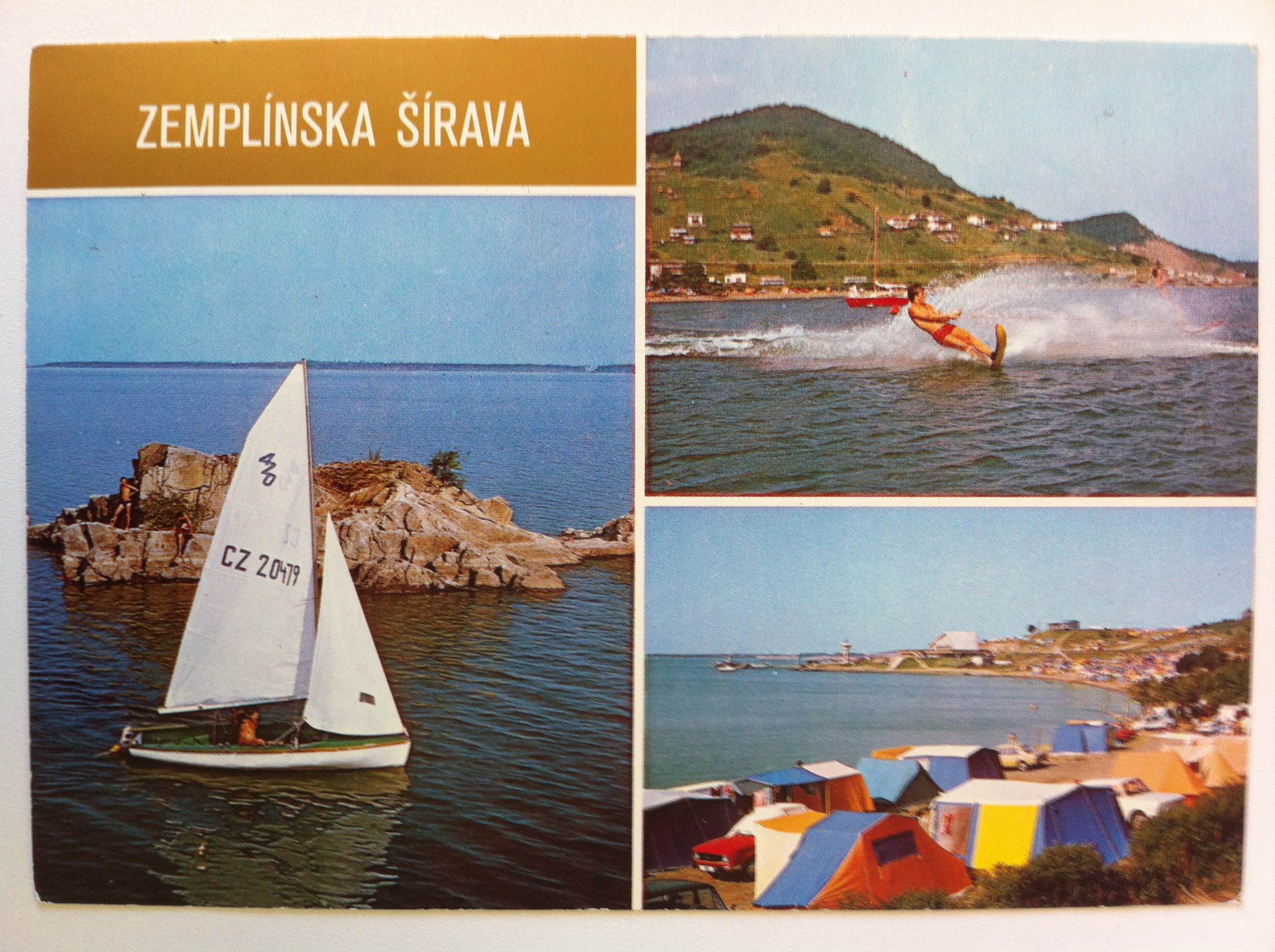 Zemplínska šírava v 80. rokoch 20. storočia